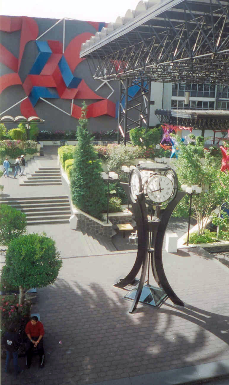 Fondo. Mural hecho por Manuel Felguérez para la ULSA (Universidad La Salle, Campus central.) Foto de plaza La salle. - Mural sculpture by Manuel Felguérez